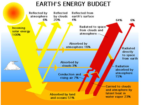 Context